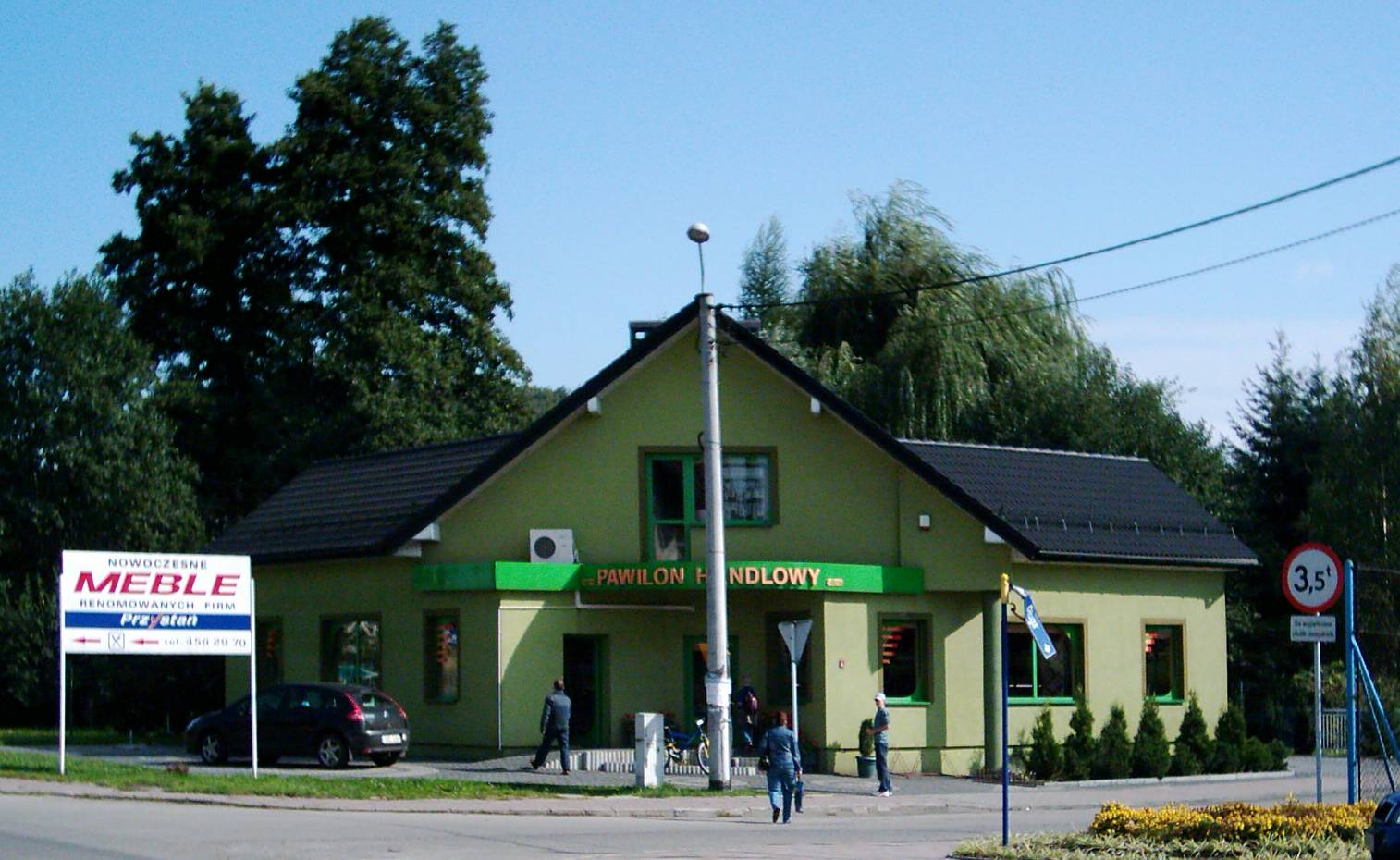 Wodzisław Śląski - Pawilon Handlowy w Zawadzie - dzielnicy Wodzisławia Śląskiego.